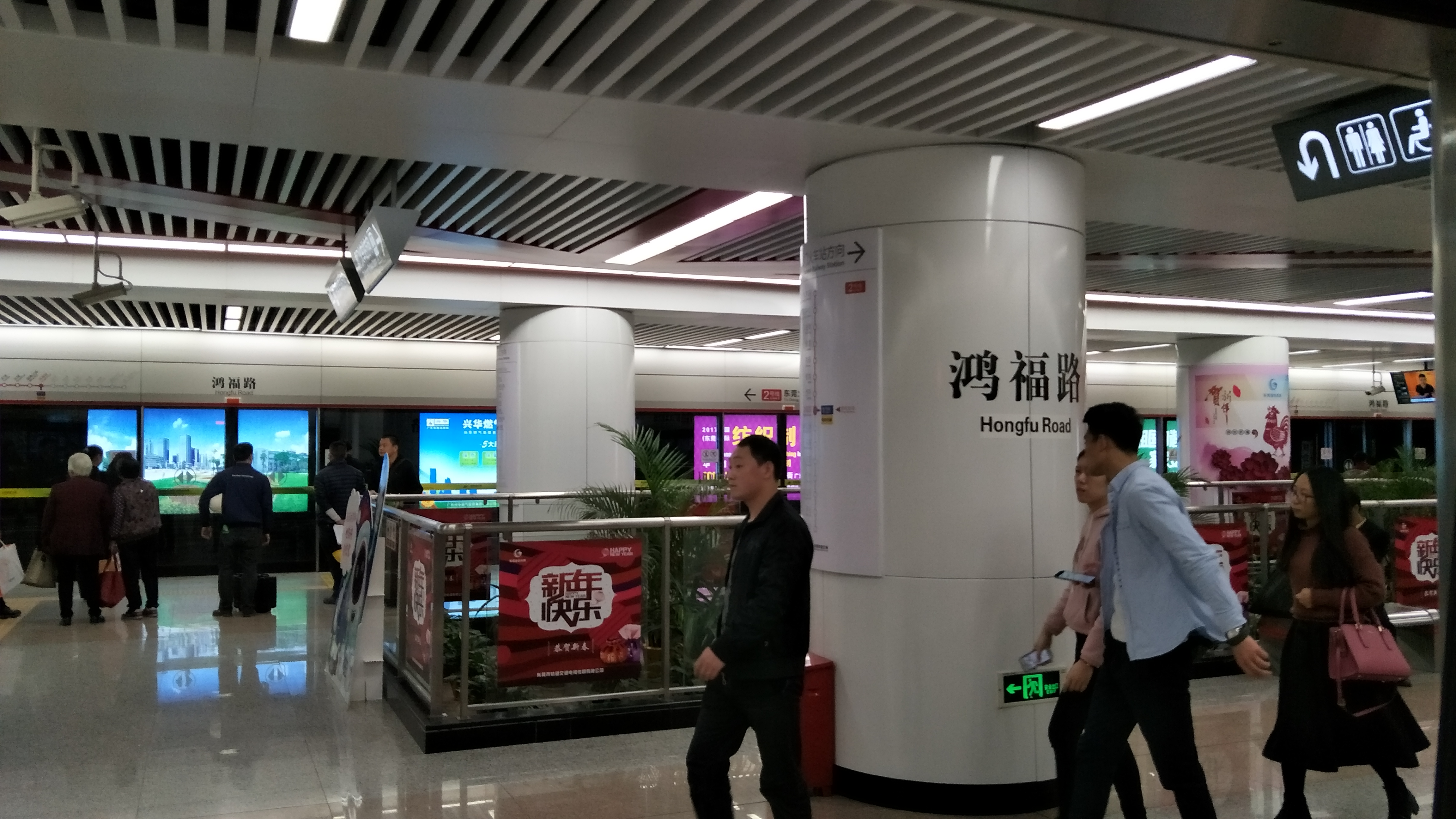 鸿福路站月台